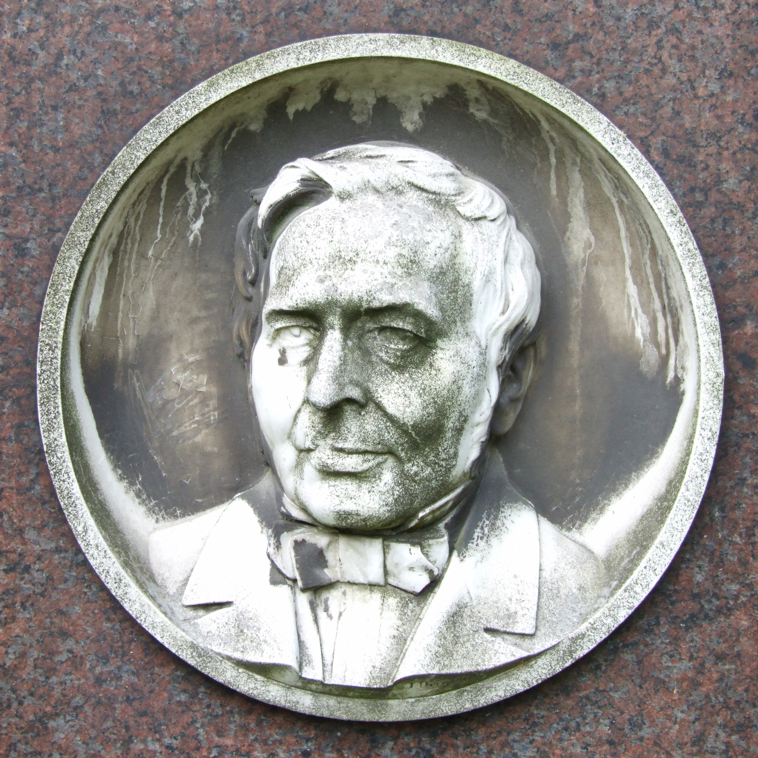 Medaillon auf dem Grabstein von Ludwig Erk (6.Januar 1807 – 25.November 1883).